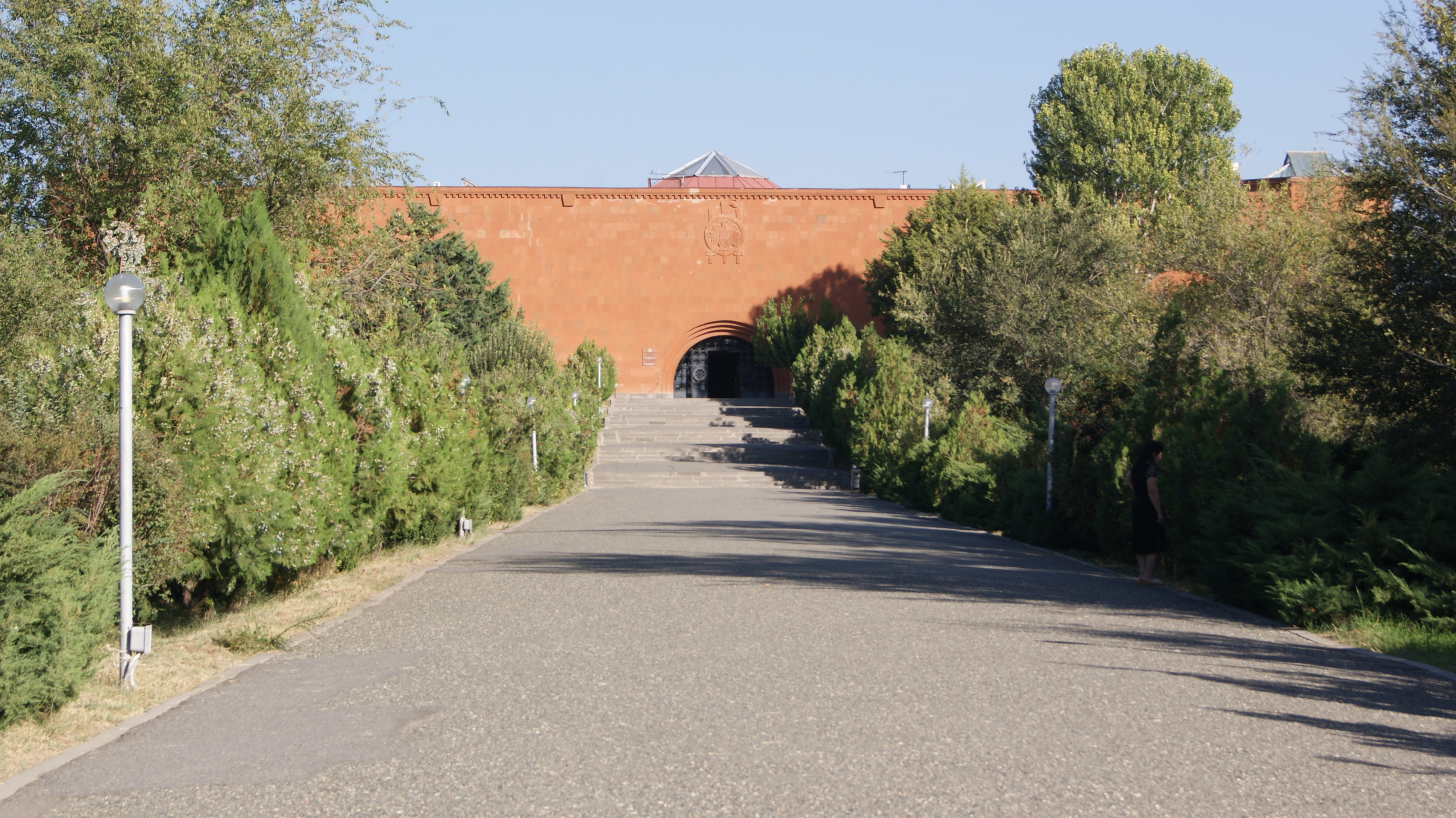 Թանգարանի շենք. Հայաստանի ազգագրության պետական թանգարանը 59/3.1